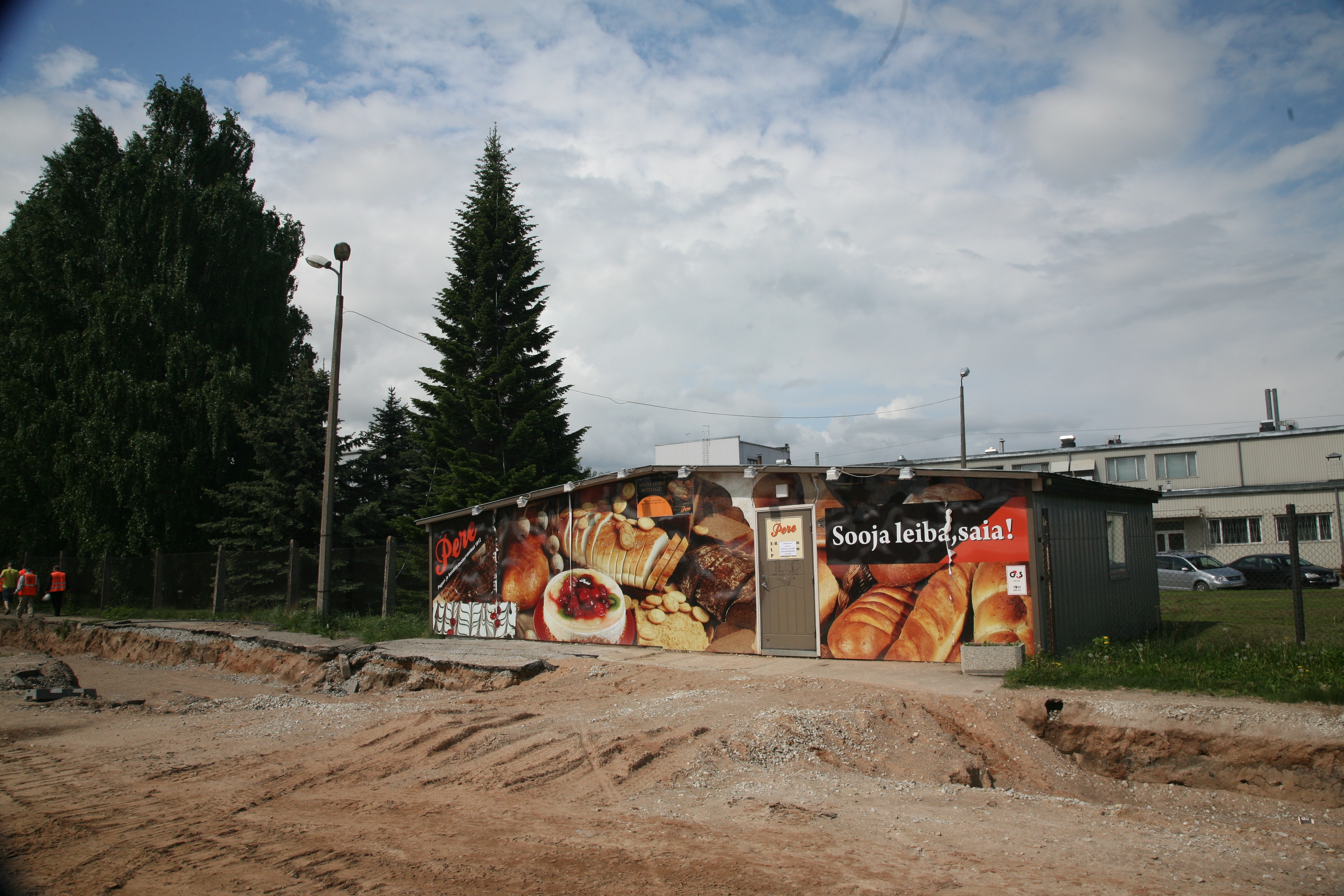 Pere Leiva pagarikiosk Idaringtee ehituse ajal, 28. mai 2013